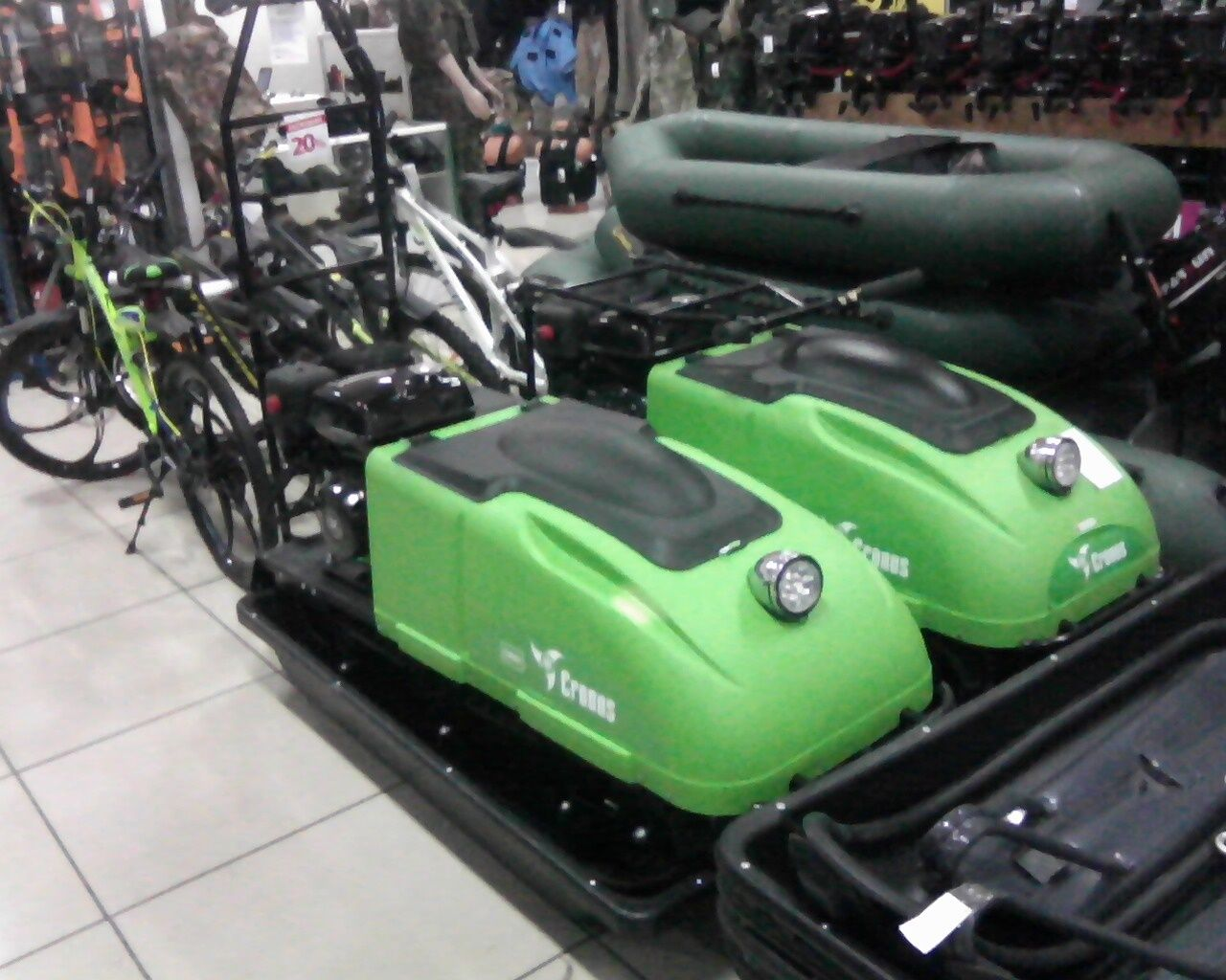 Мотобуксировщик Кронос в магазине